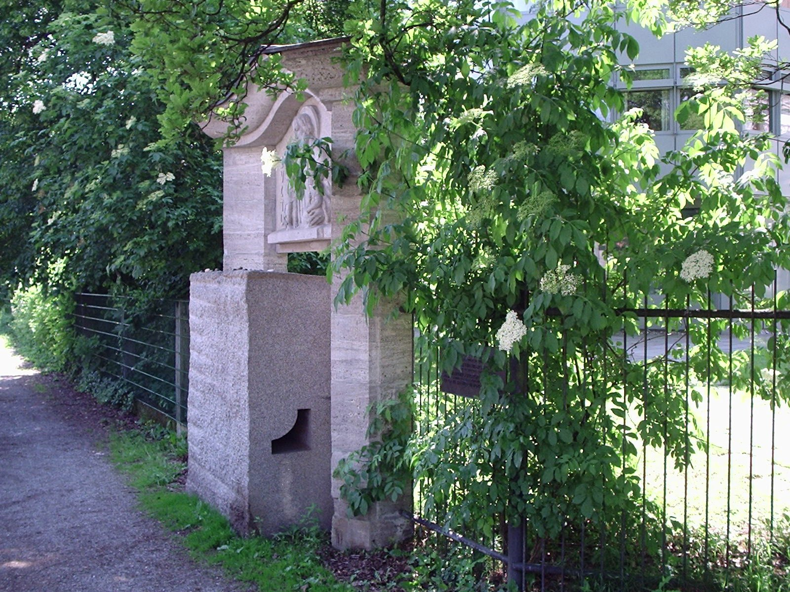 Mahnmal für das ehemalige jüdische Sammellager im Münchner Stadtteil Berg am Laim. Der Granitblock wurde 1987 von Nikolaus Gerhart geschaffen und unter dem noch erhaltenen, jetzt frei steheden Portal des ehemaligen Gebäudes platziert. Rechts daneben Gedenktafel für Else Rosenfeld. Clemens-August-Straße, München.